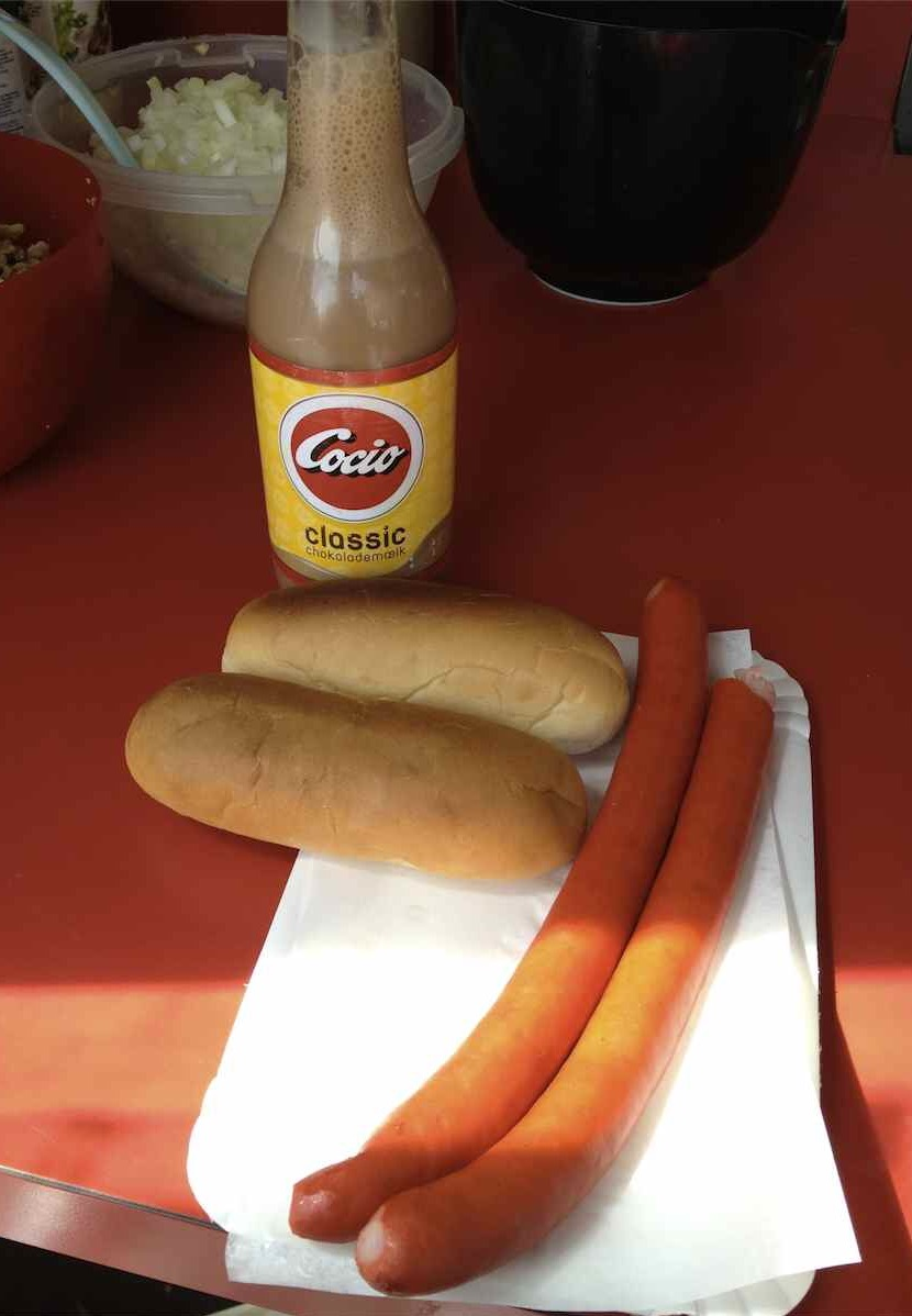 0,33 liter Cocio og to røde pølser i en pølsevogn.